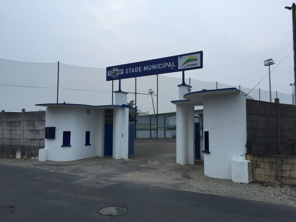 Entrée du stade municipal de Péronnas